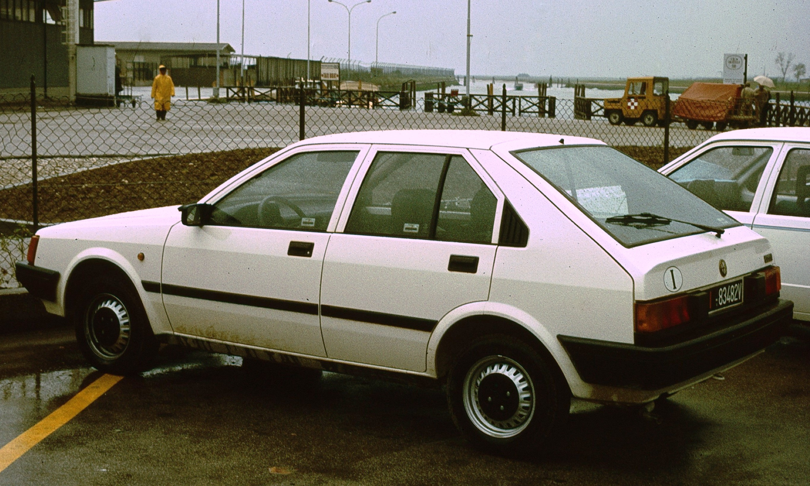 Alfa Romeo Arna 4 door